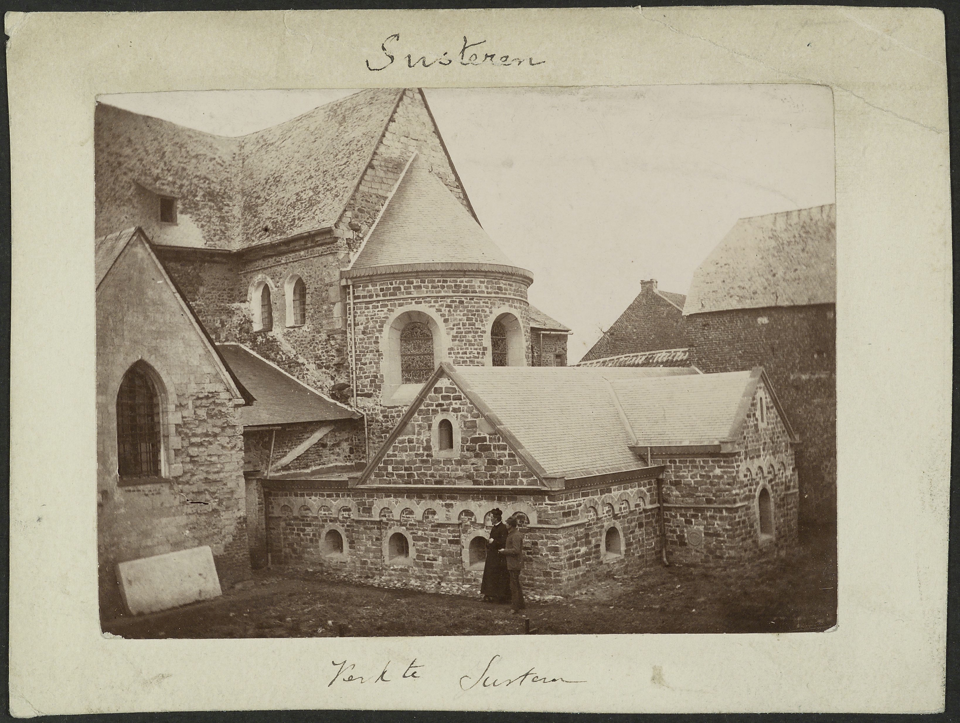 Rooms-Katholieke Kerk: Zicht vanuit het zuidoosten